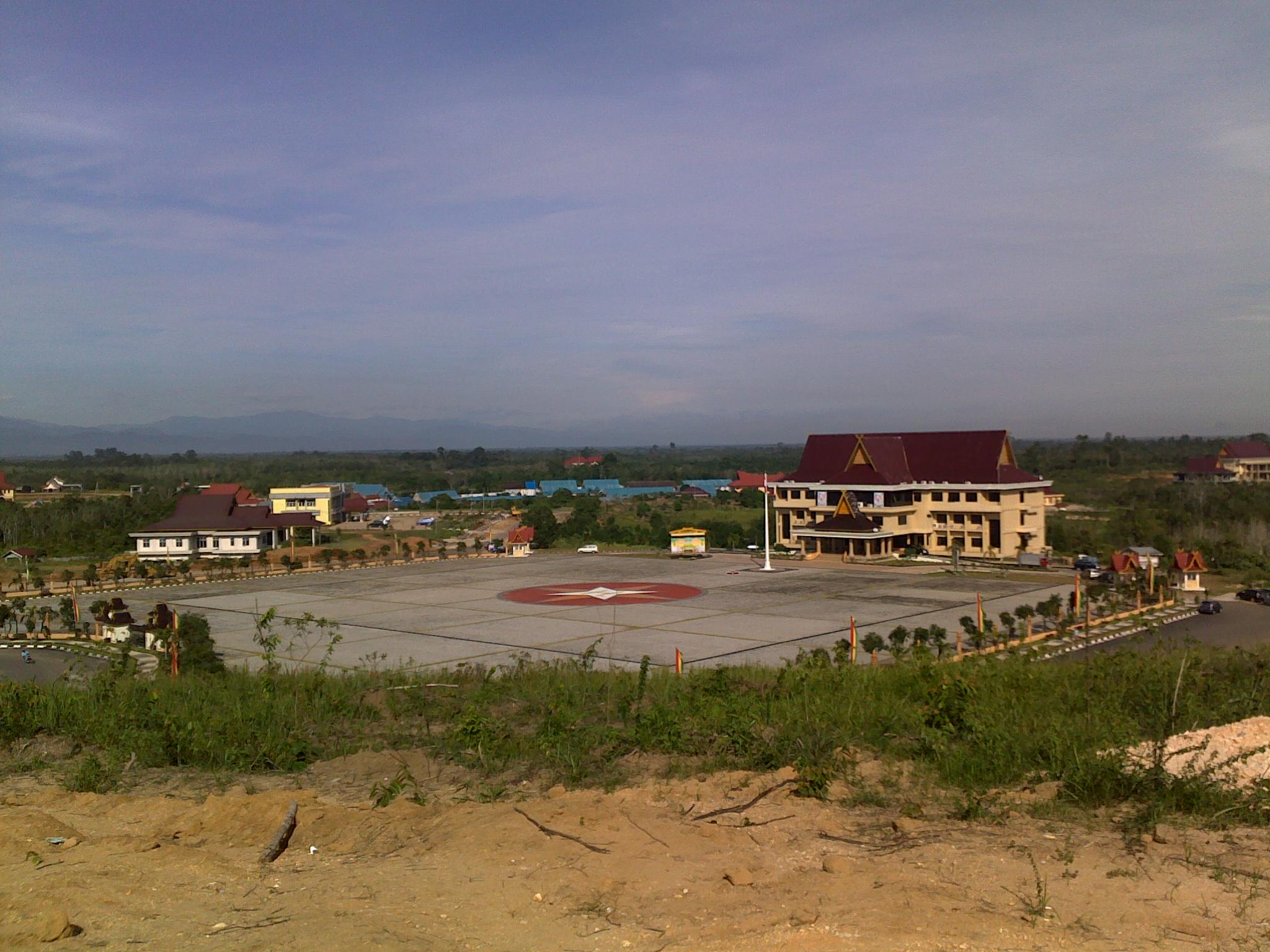 Kantor Bupati Rokan Hulu dari Rumah Dinas Bupati